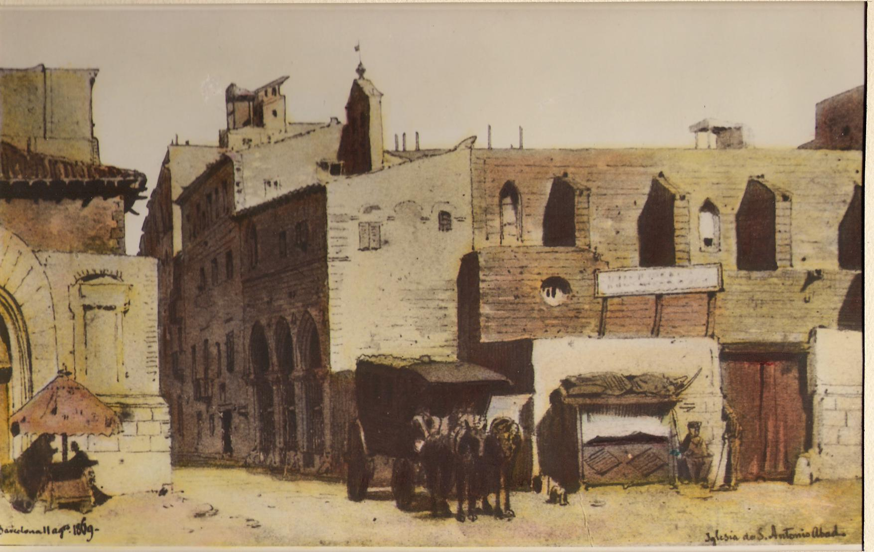 Pintura antiga Església de Sant Antoni Abat de del Portal de Sant Antoni